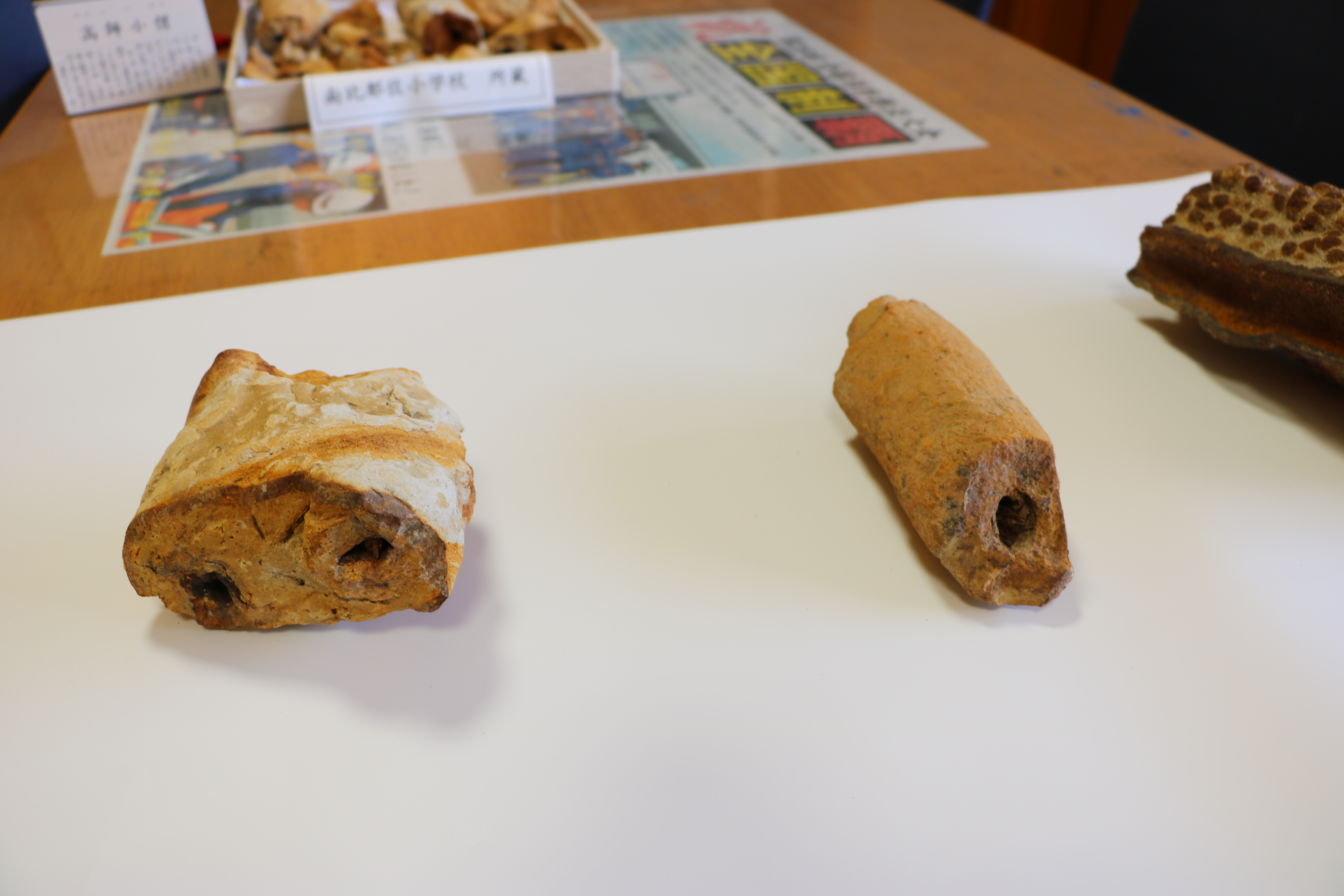 別所高師小僧（国指定天然記念物、滋賀県蒲生郡日野町）南比都佐公民館所蔵。公民館主事立ち合いのもと撮影。